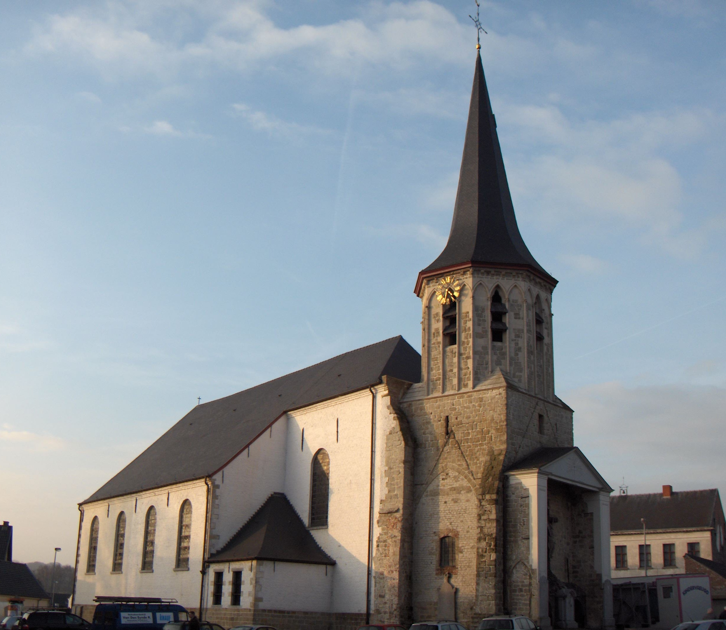 Aaigem (Ortsteil der Gemeinde Erpe-Mere), Belgien, Prov. Ostflandern. Nikolaikirche (Sint-Niklaas- en Sint Leonarduskerk); gotischer Turm (ehemaliger Westturm), Schiff aus dem 18. Jh.